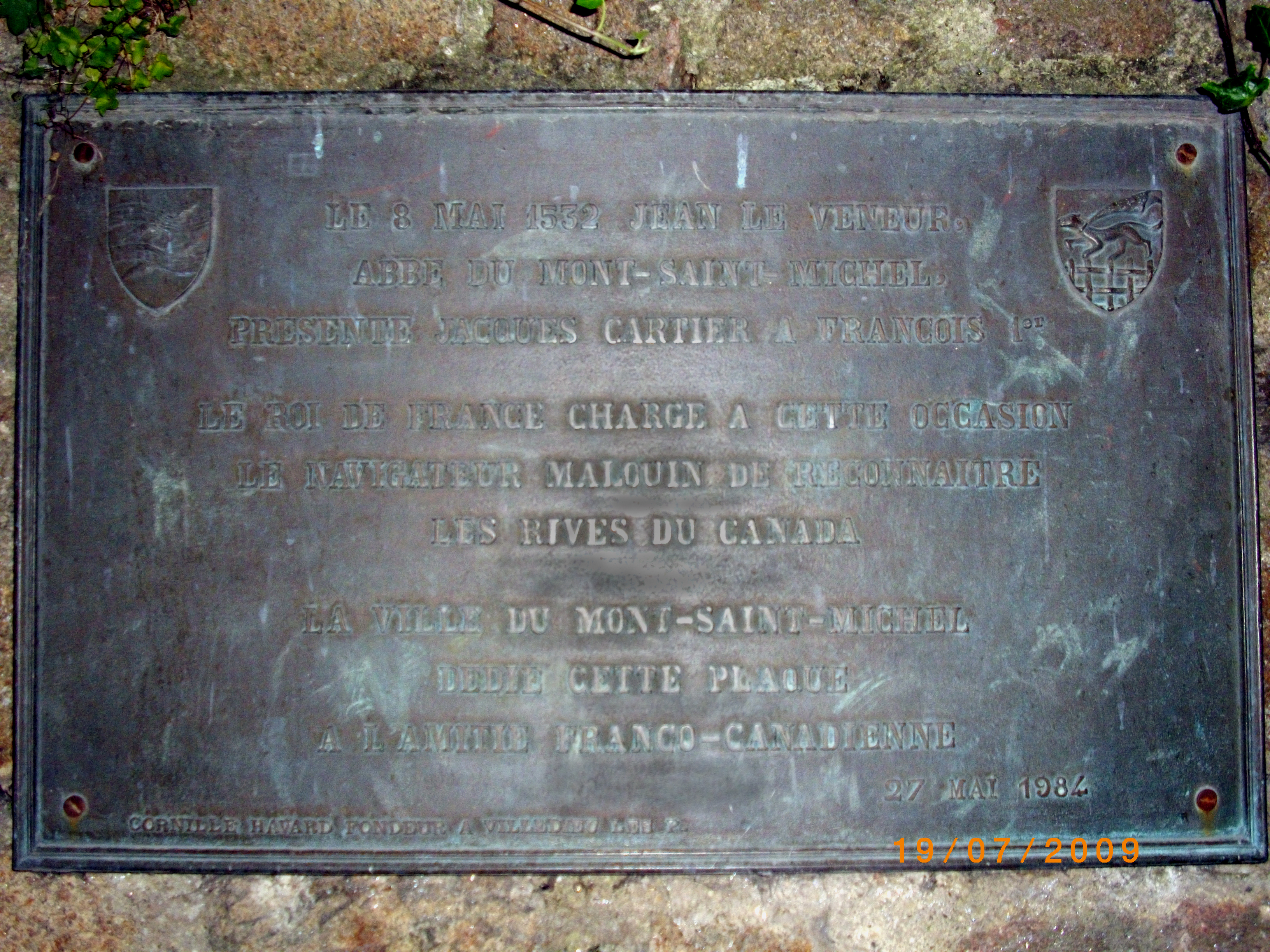 Η αναμνηστική πλάκα για τον Καρτιέ στο Μον-Σαιν-Μισέλ